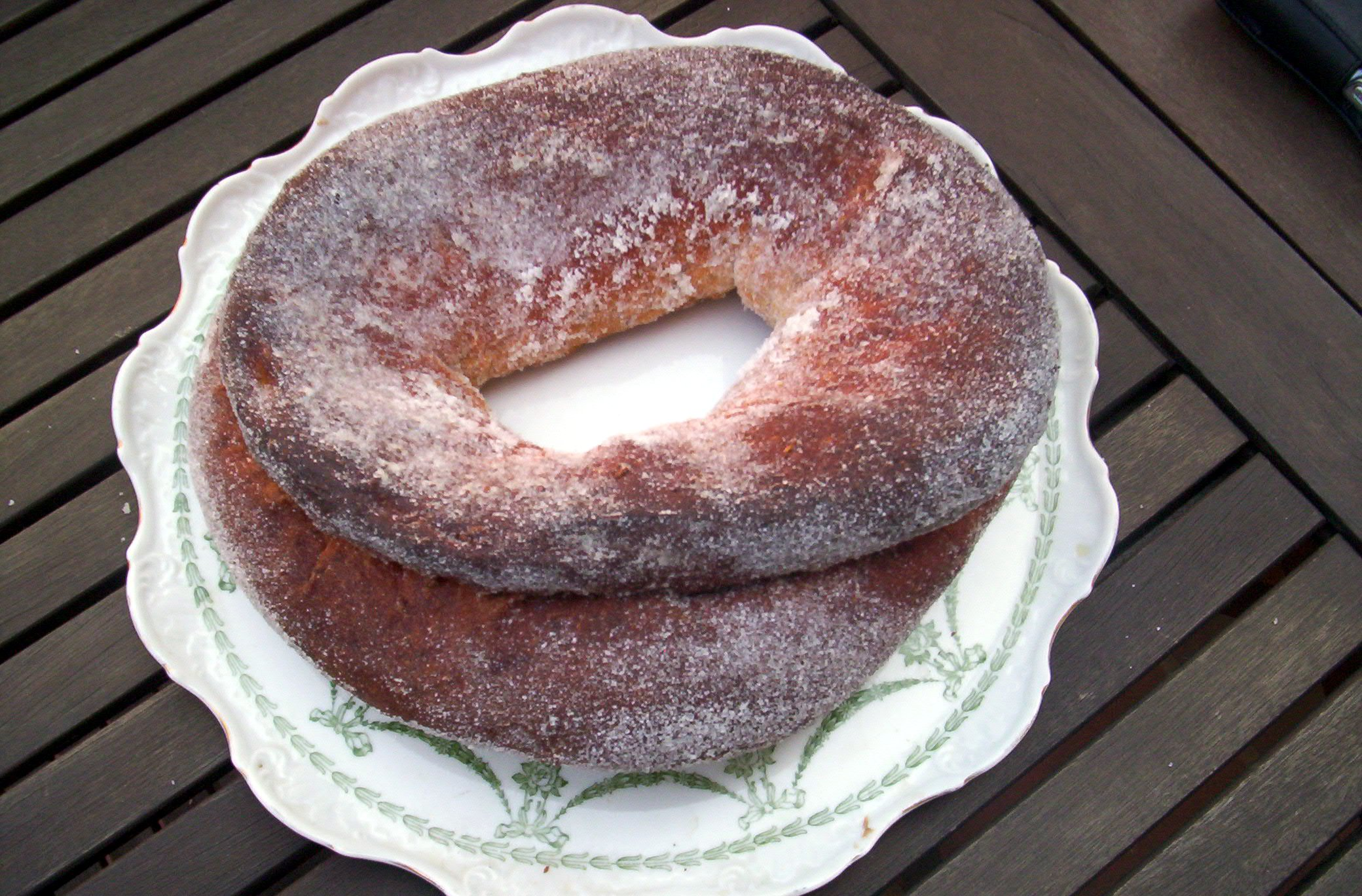 La Coca Garlanda és una coca típica de Vilafranca del Penedés, que també es consumeix a altres indrets de l'Alt Penedés. Té forma de roscó i entre els seus ingredients característics hi figura la matafaluga.